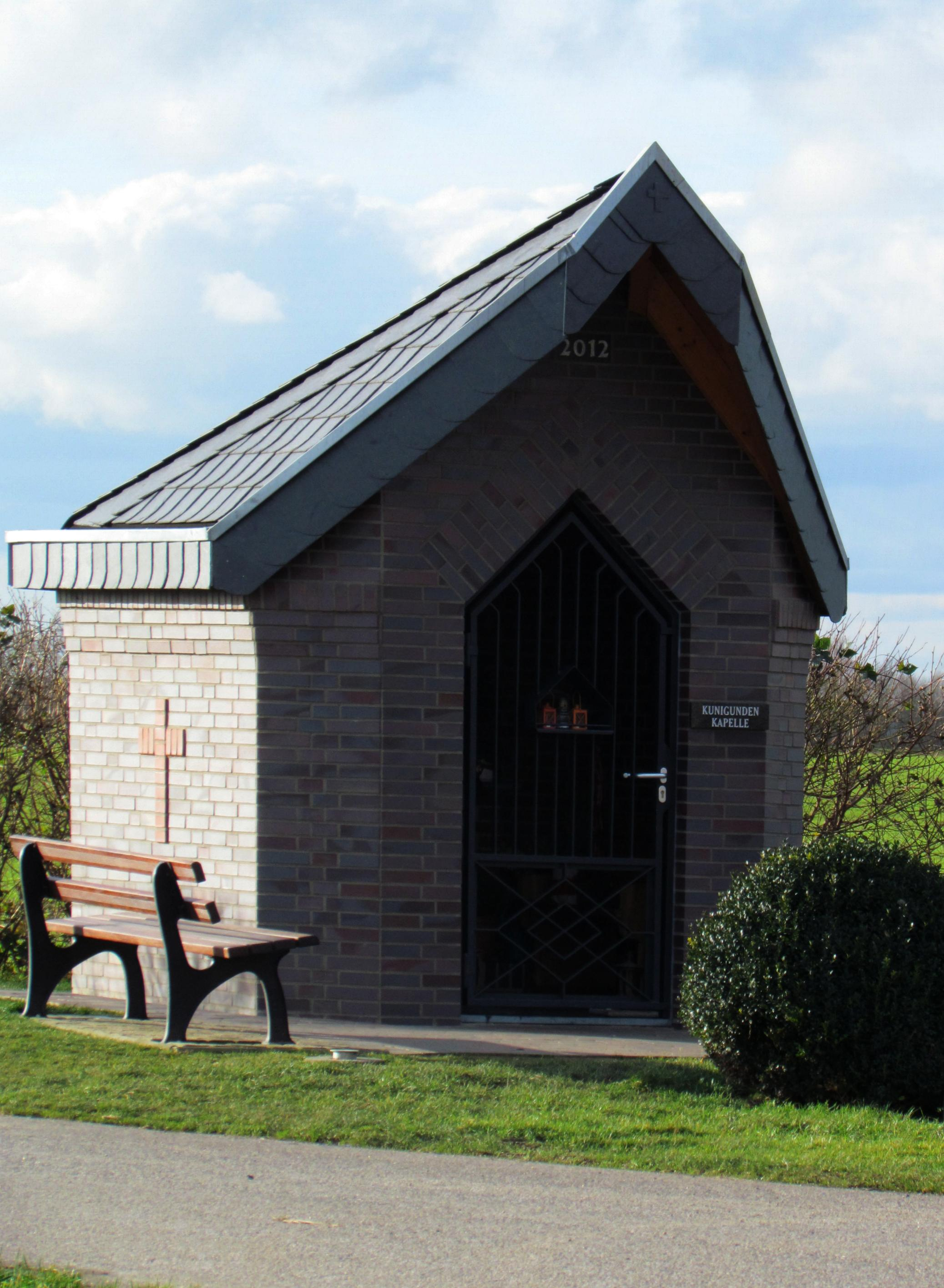 Kirchen und Kapellen in der Stadt Geilenkirchen